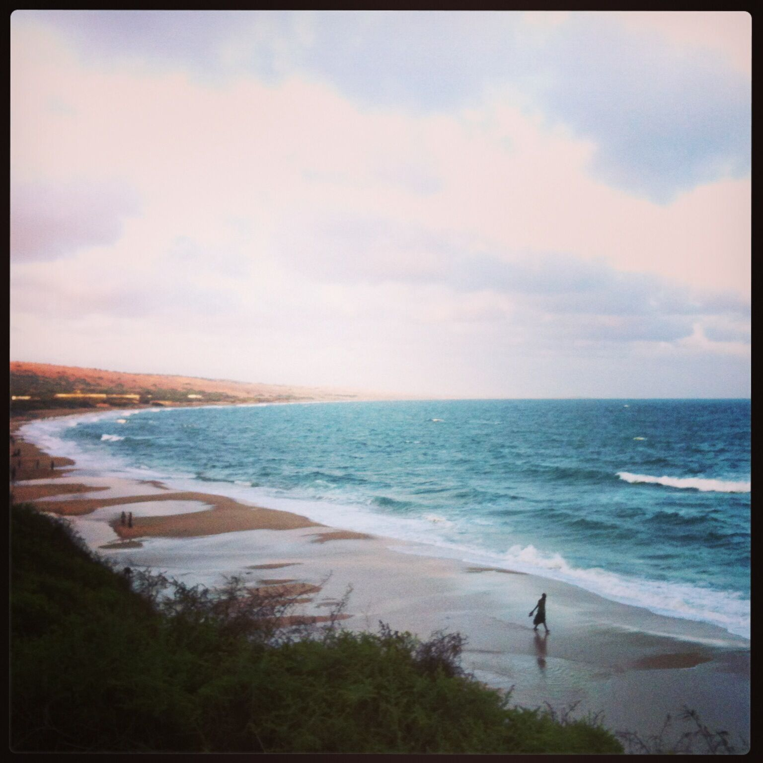 Soomaaliga: dhuxul baraawe